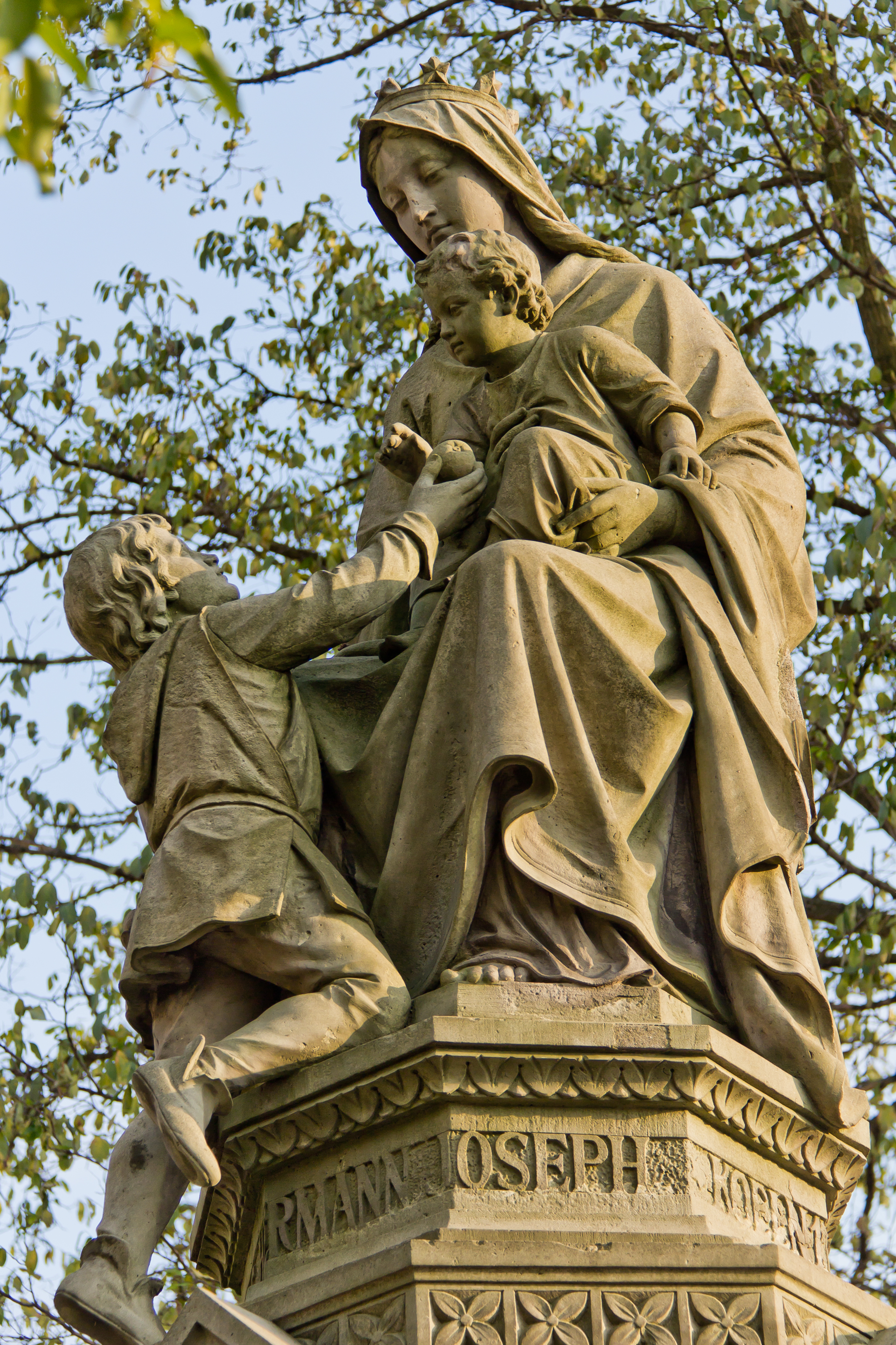 Hermann-Joseph-Brunnen, Waidmarkt, Köln This is a photograph of an architectural monument.